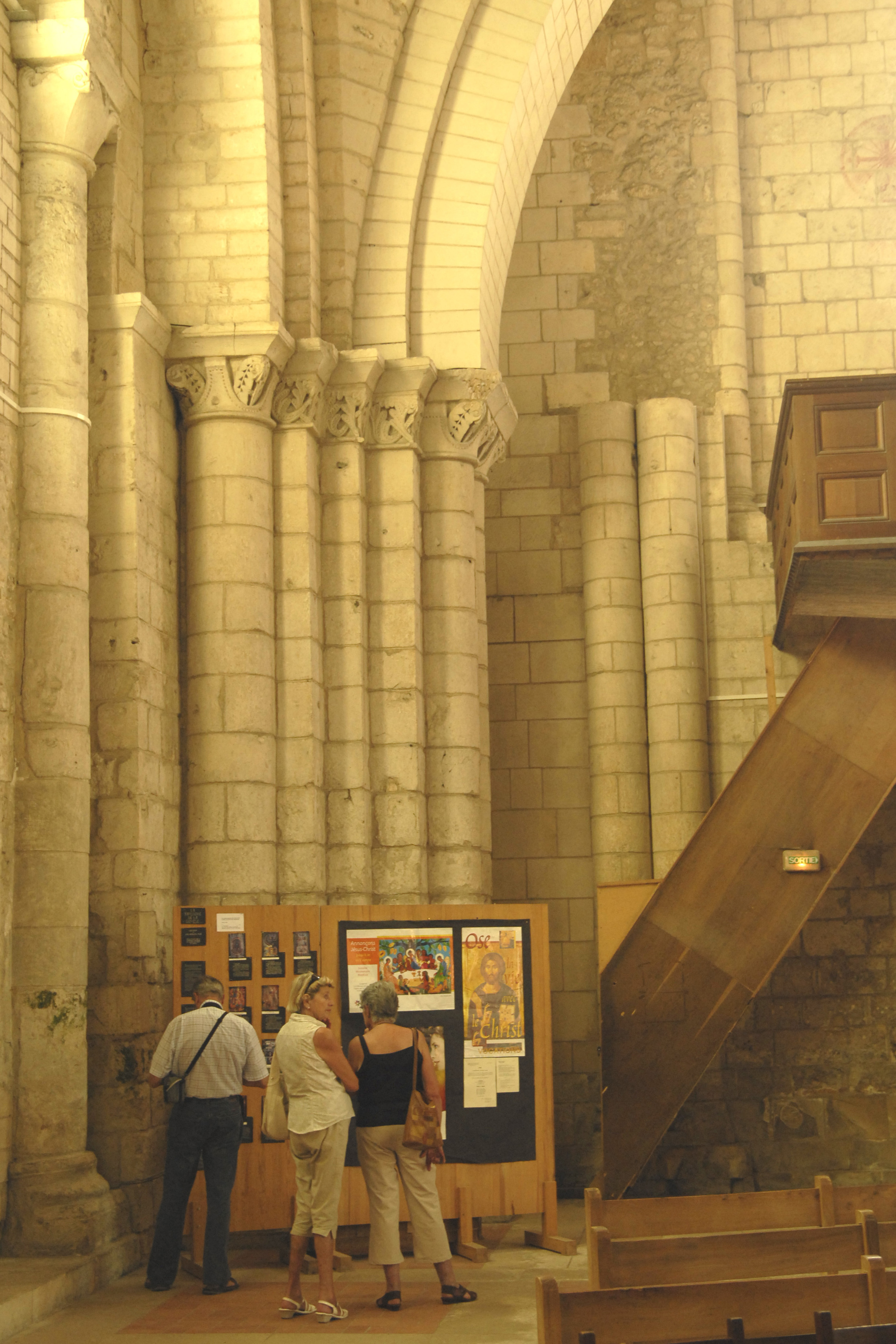 Abbaye aux Dames Saintes, Abteikirche, Schiff Südseite, SW-Ecke